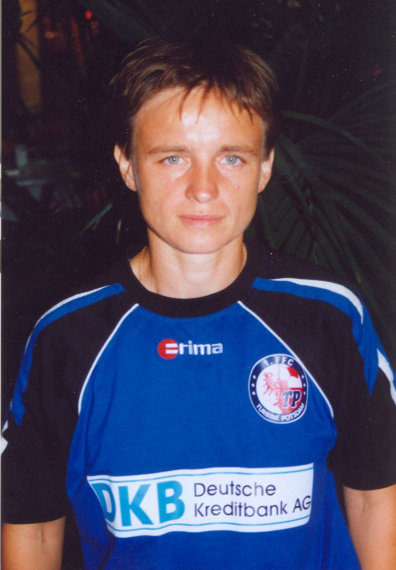 Maria Makowska (ur. 25 stycznia 1969) – polska piłkarka grająca na pozycji obrońcy, reprezentantka Polski.